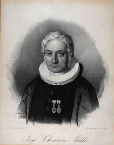 Tage Christian Müller (1780-1849), biskop i Ribe